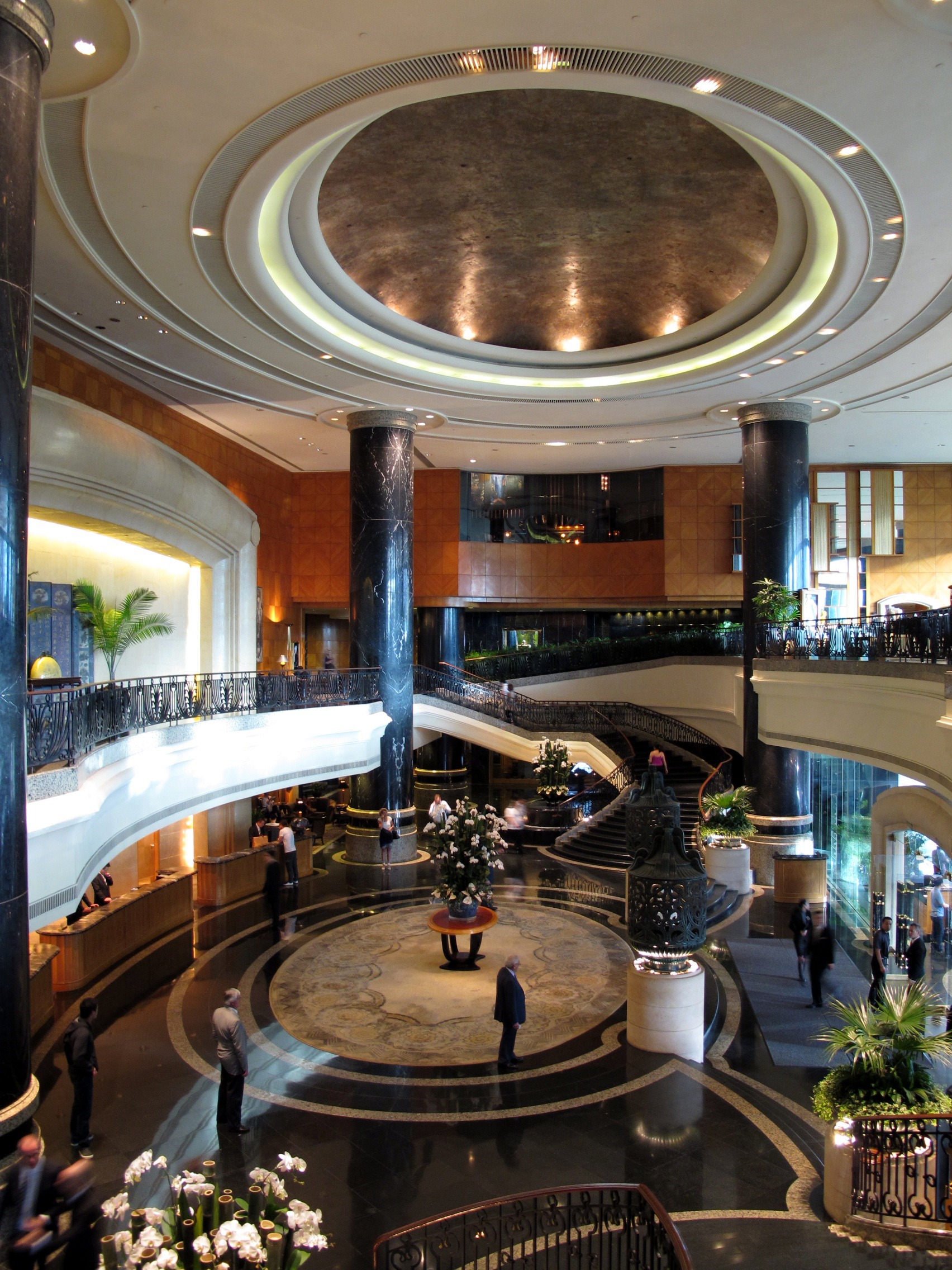 Grand Hyatt Hong Kong Hotel Lobby